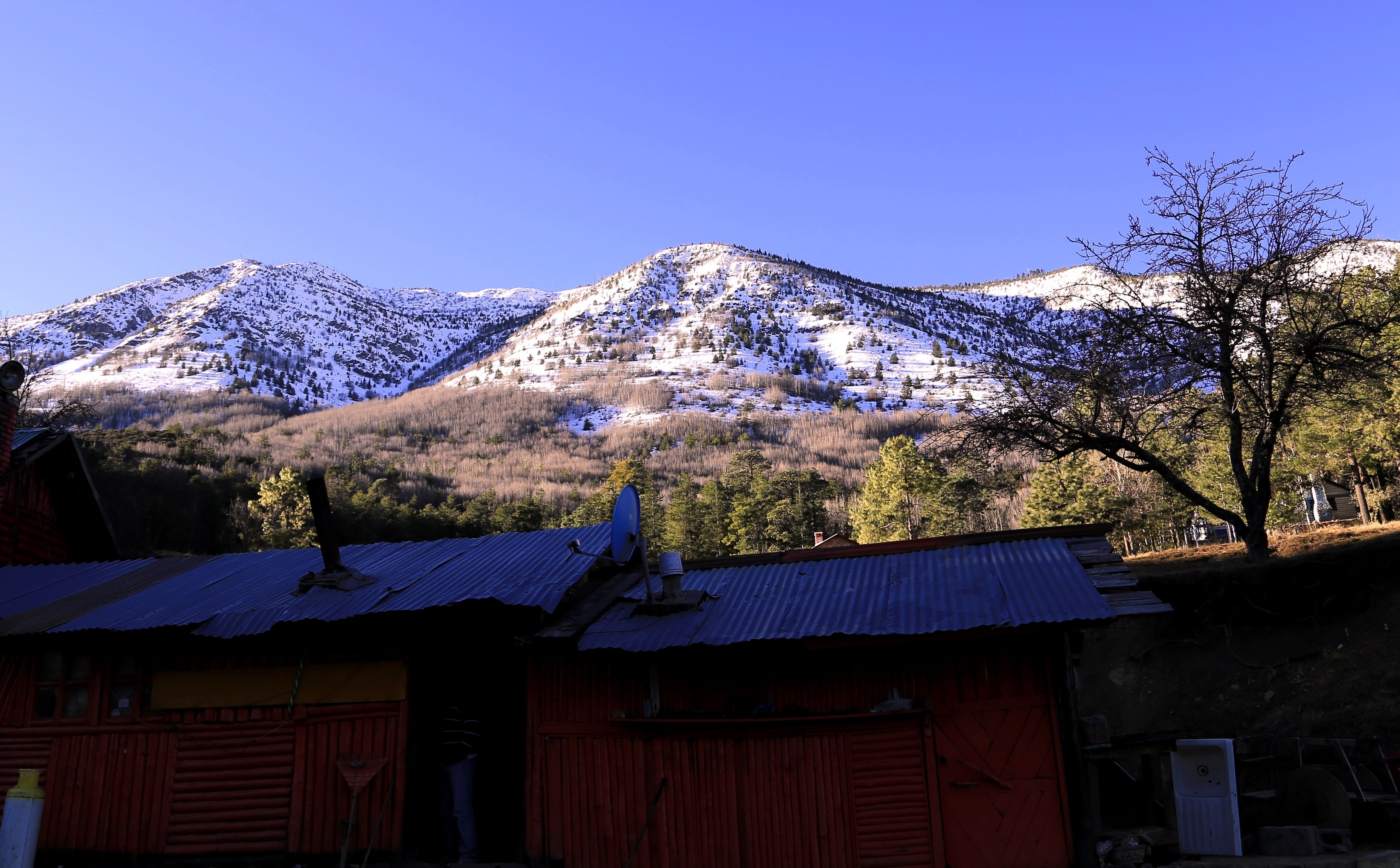 Arteaga Coahuila México